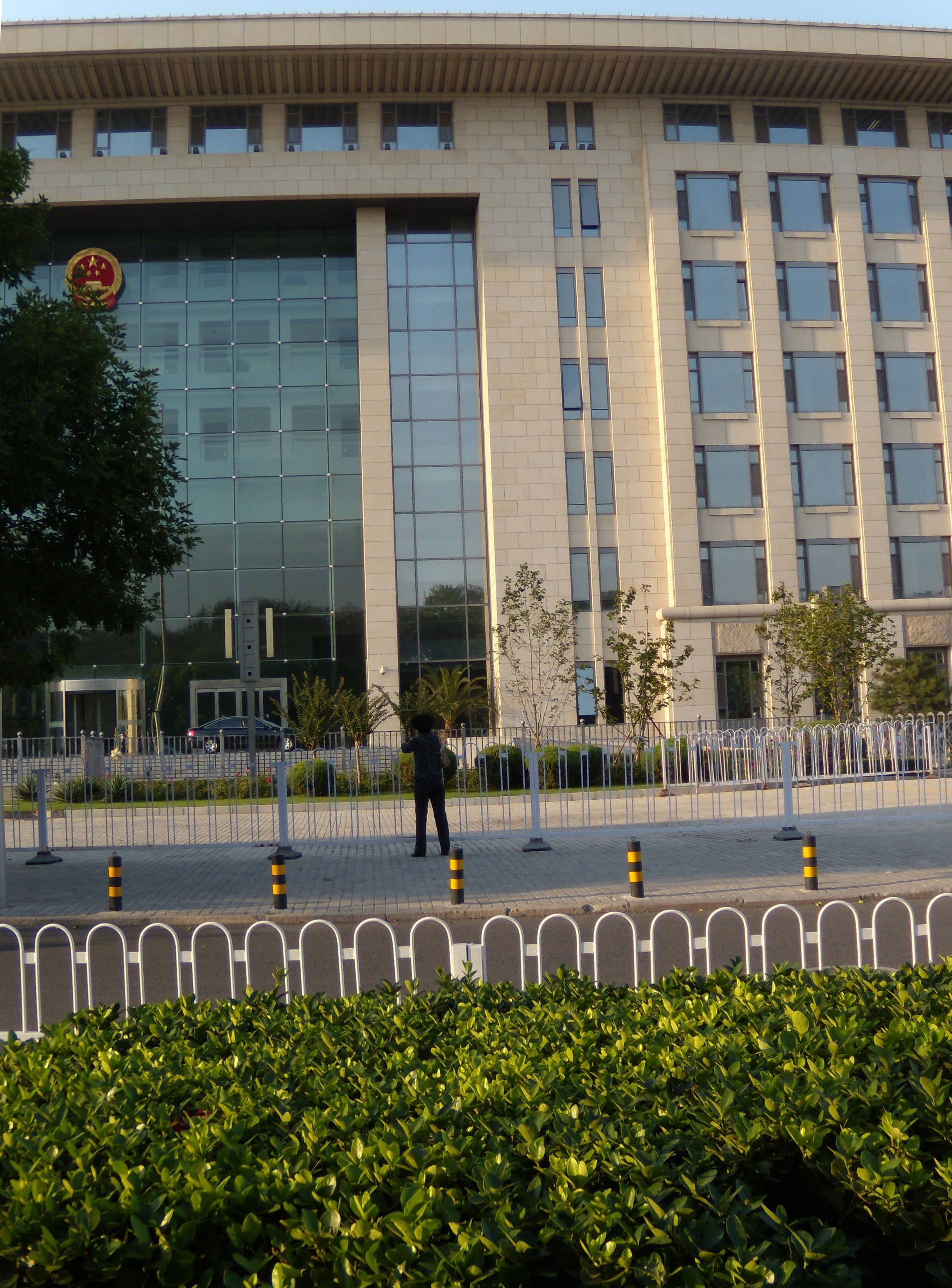 中文（中国大陆）: 全国人大机关办公楼南门。